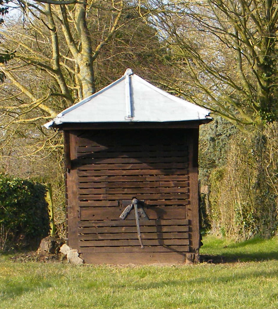 Vergies, Somme, Fr, puits du patrimoine, près de la place du village.